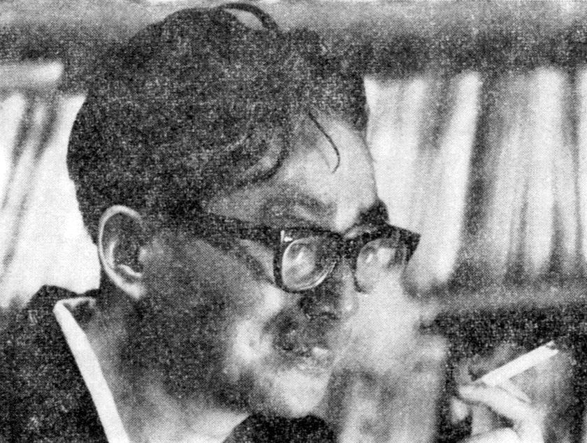 毎日新聞社編『人間形成ある根性. 続』（1964）より辻亮一